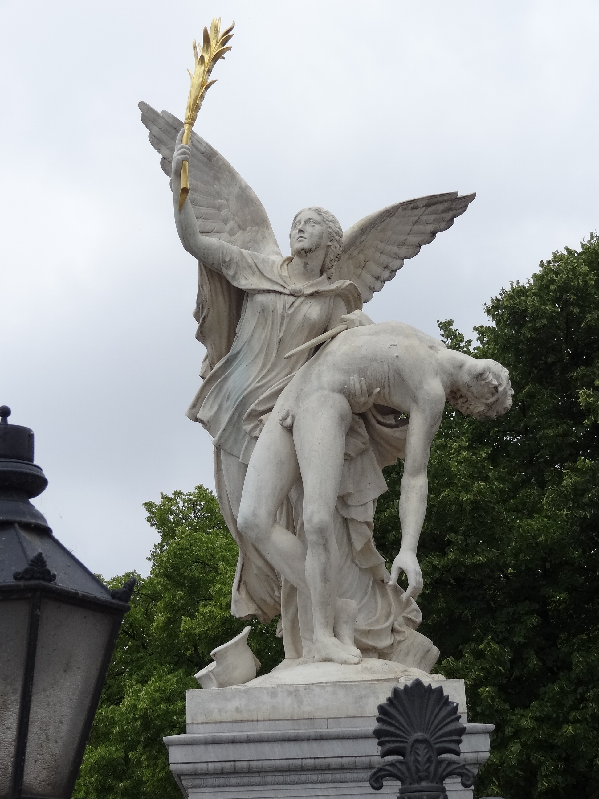 Berlin unsort